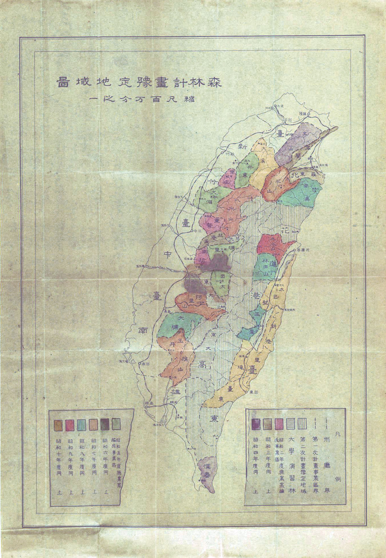 台灣日治時期不同年度的森林事業區，以及大學演習林分布。